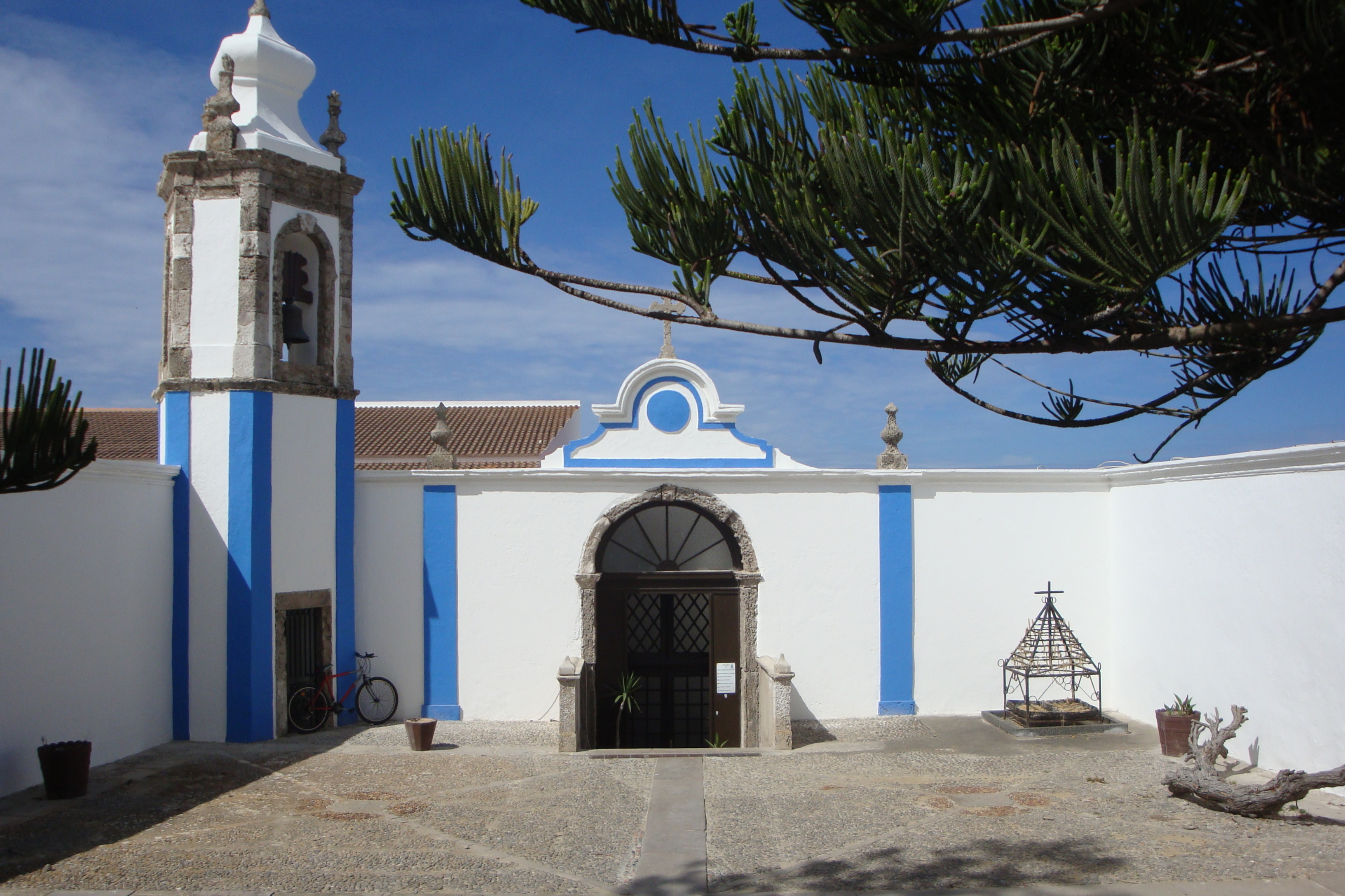 Santuário de Nossa Senhora dos Remédios, concelho de Peniche, distrito de Leira, Portugal